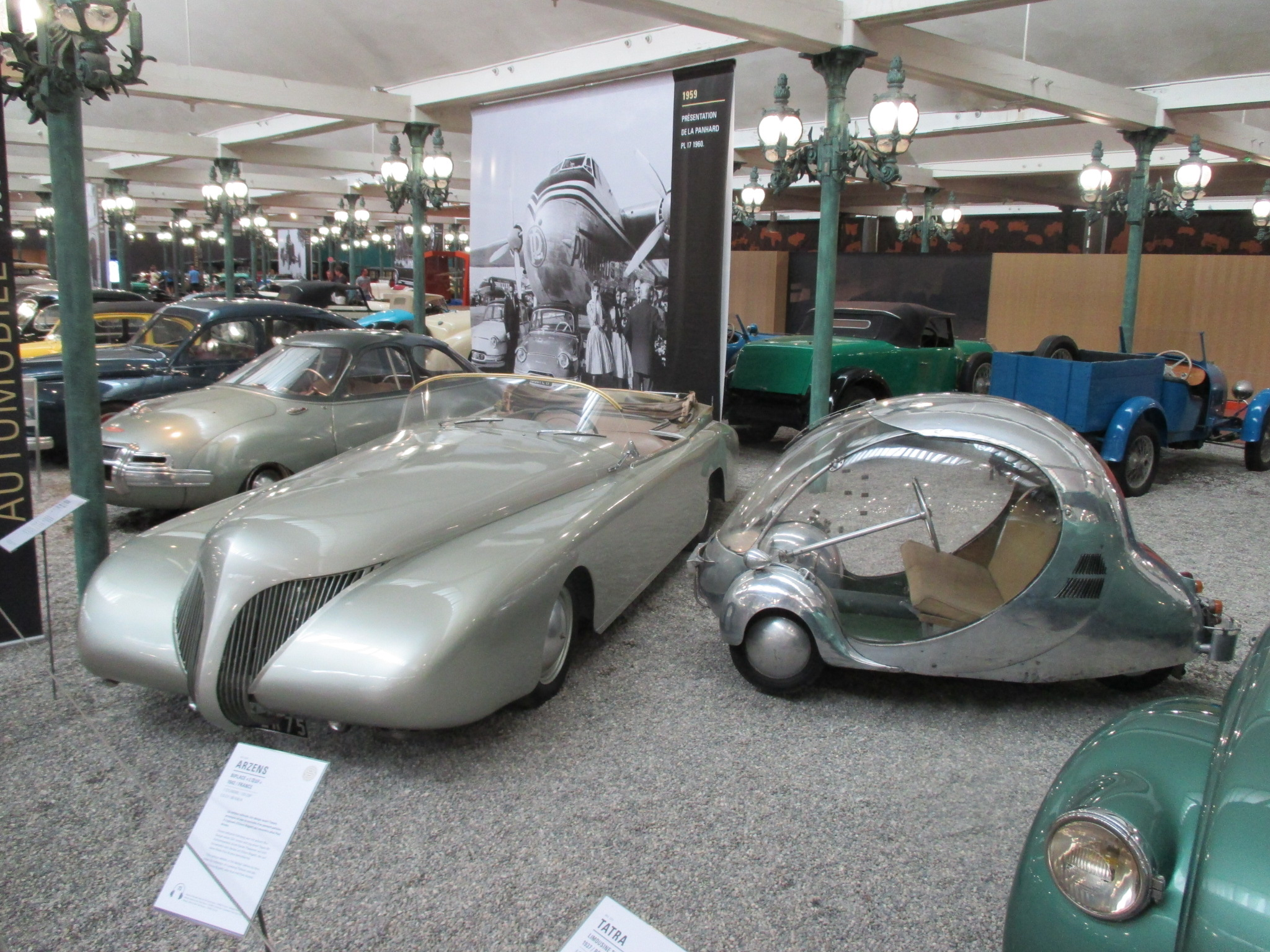 Paul Arzens : La Baleine 1938, et L'Œuf 1942 (devant une Panhard Dynavia 1948 au font)